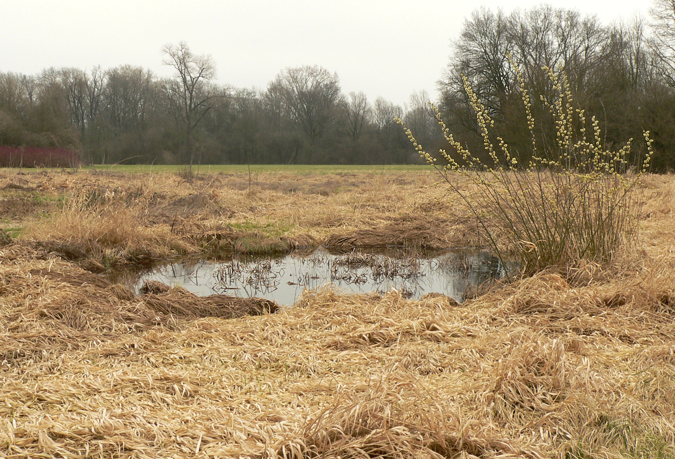 Bombentrichter im Hermann Löns Park in Hannover